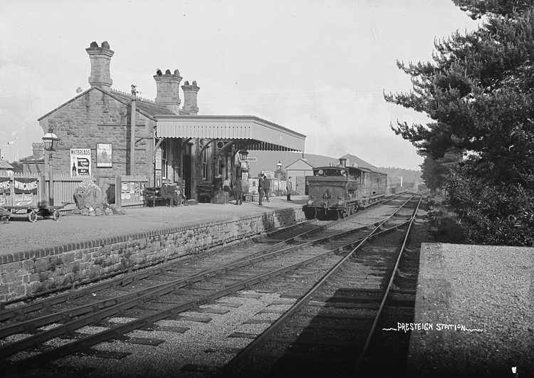 Ffotograffydd/Photographer: P B Abery (1877?-1948) Dyddiad/Date: [191-?] Cyfrwng/Medium: Negydd gwydr / Glass negative Maint/Dimensions: 119 x 163 mm. Cyfeiriad/Reference: PBA70/16 Rhif cofnod / Record no.: 4536540 Rhagor o wybodaeth am gasgliad P B Abery yn Llyfrgell Genedlaethol Cymru More information about the P B Abery Collection at the National Library of Wales